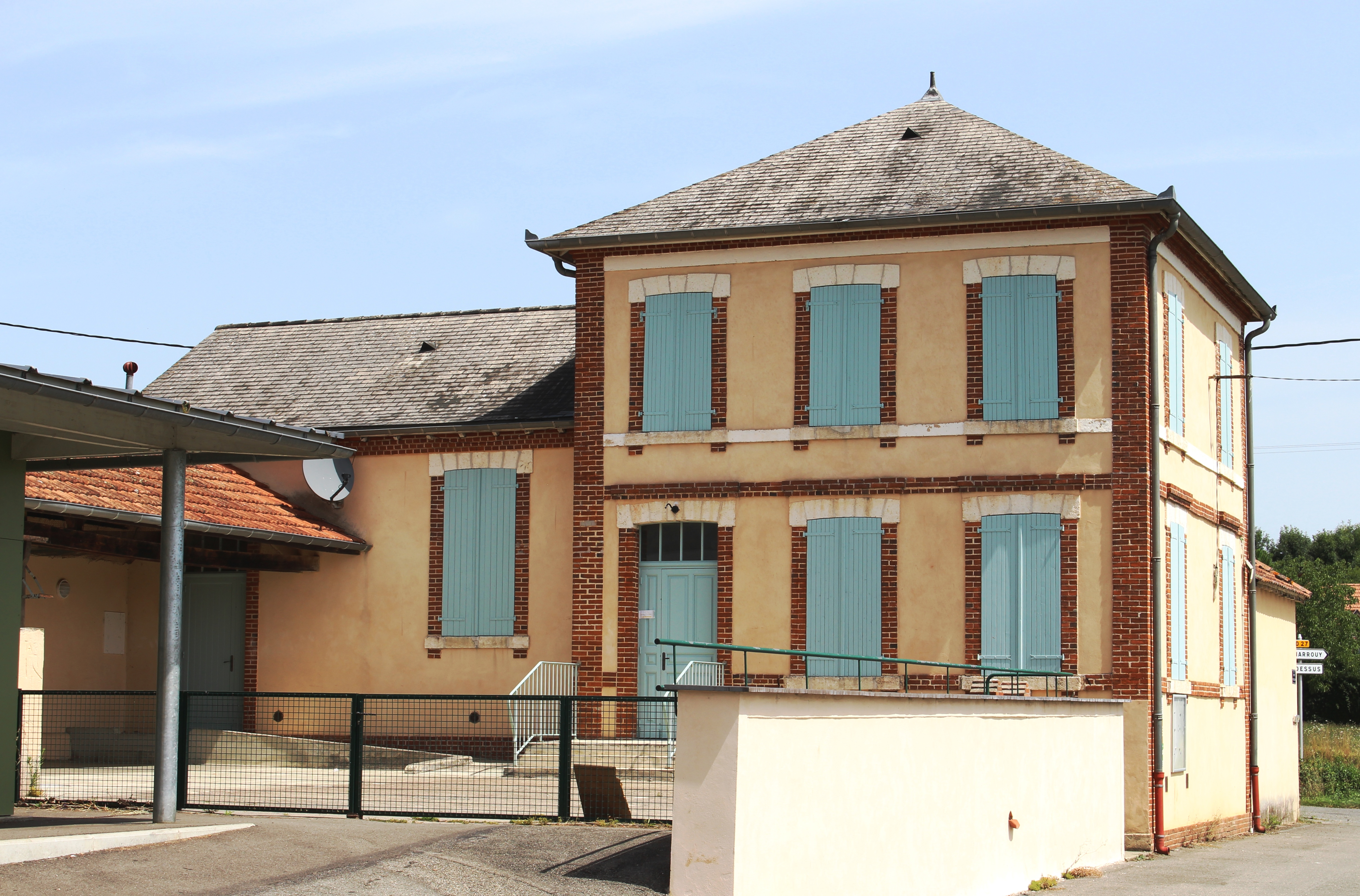 École de Tarasteix (Hautes-Pyrénées)